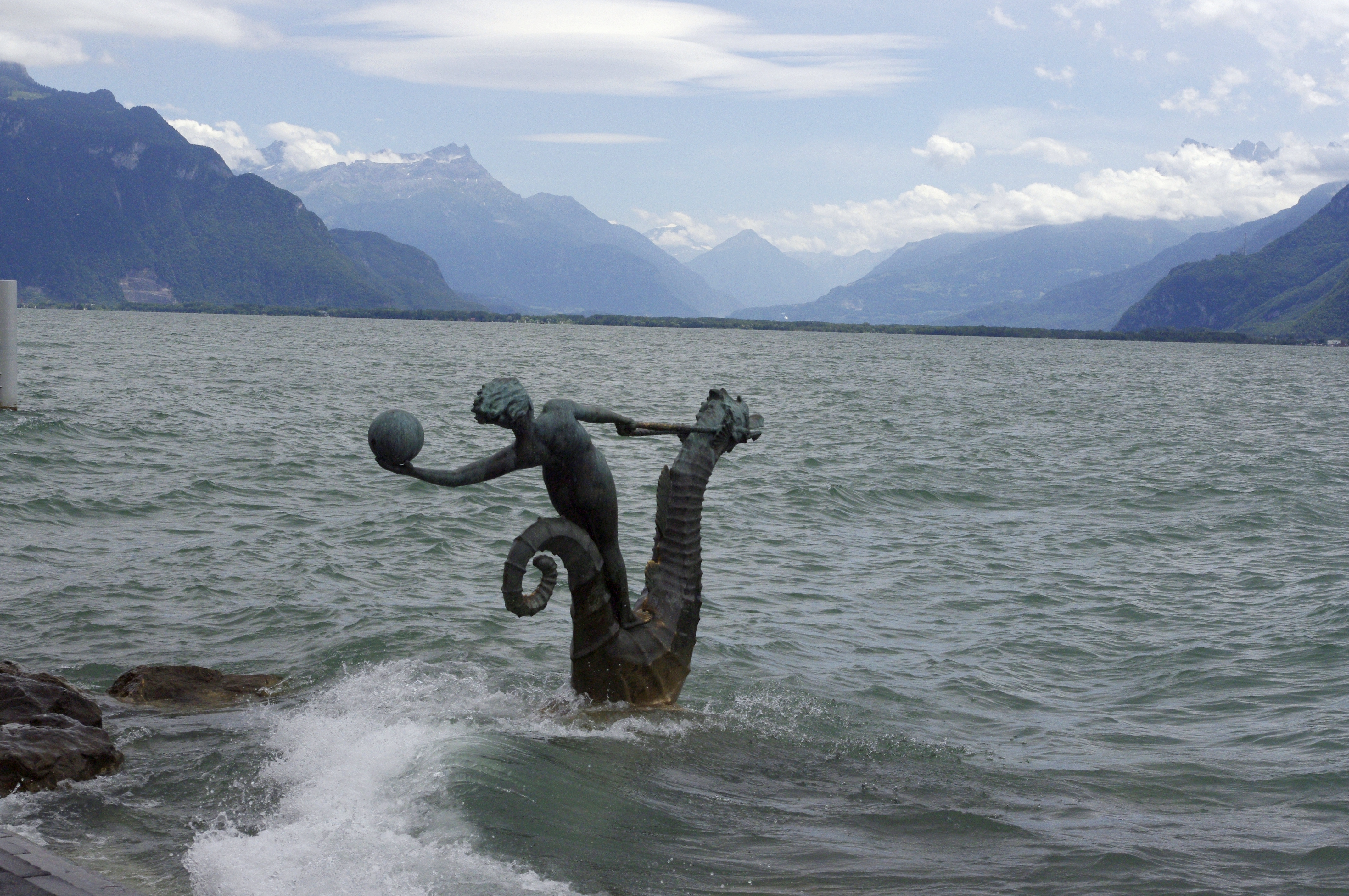 Édouard-Marcel Sandoz : Jeunes filles jouant sur des hippocampes, Vevey, Suisse